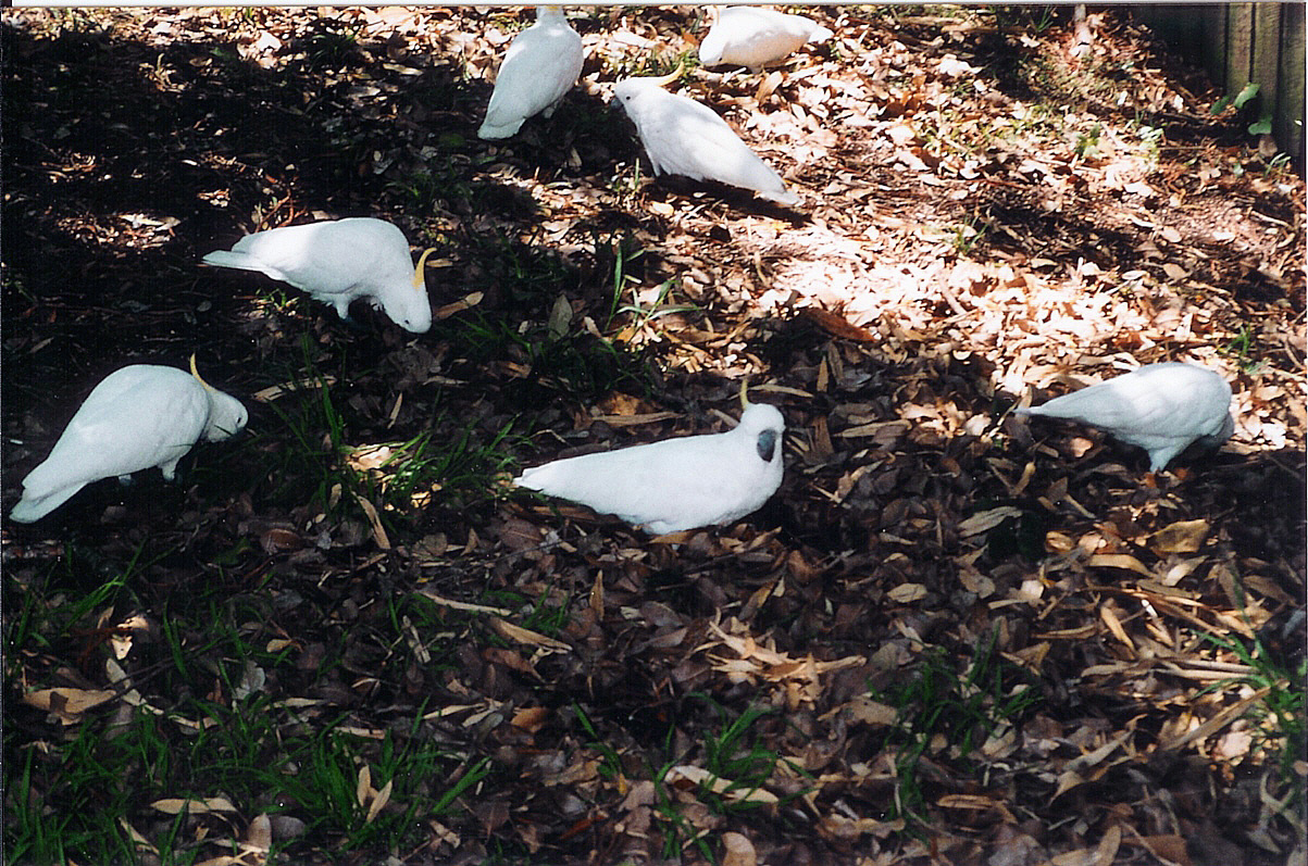 De grote Geelkuifkaketoes in Het Domain (Sydney, Australië) Eigen opname